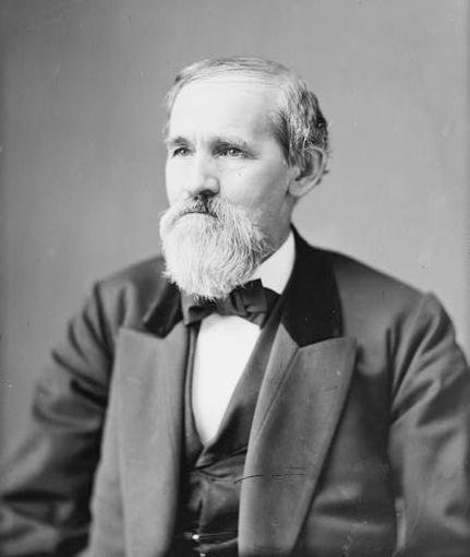 Hon Van Vorhes